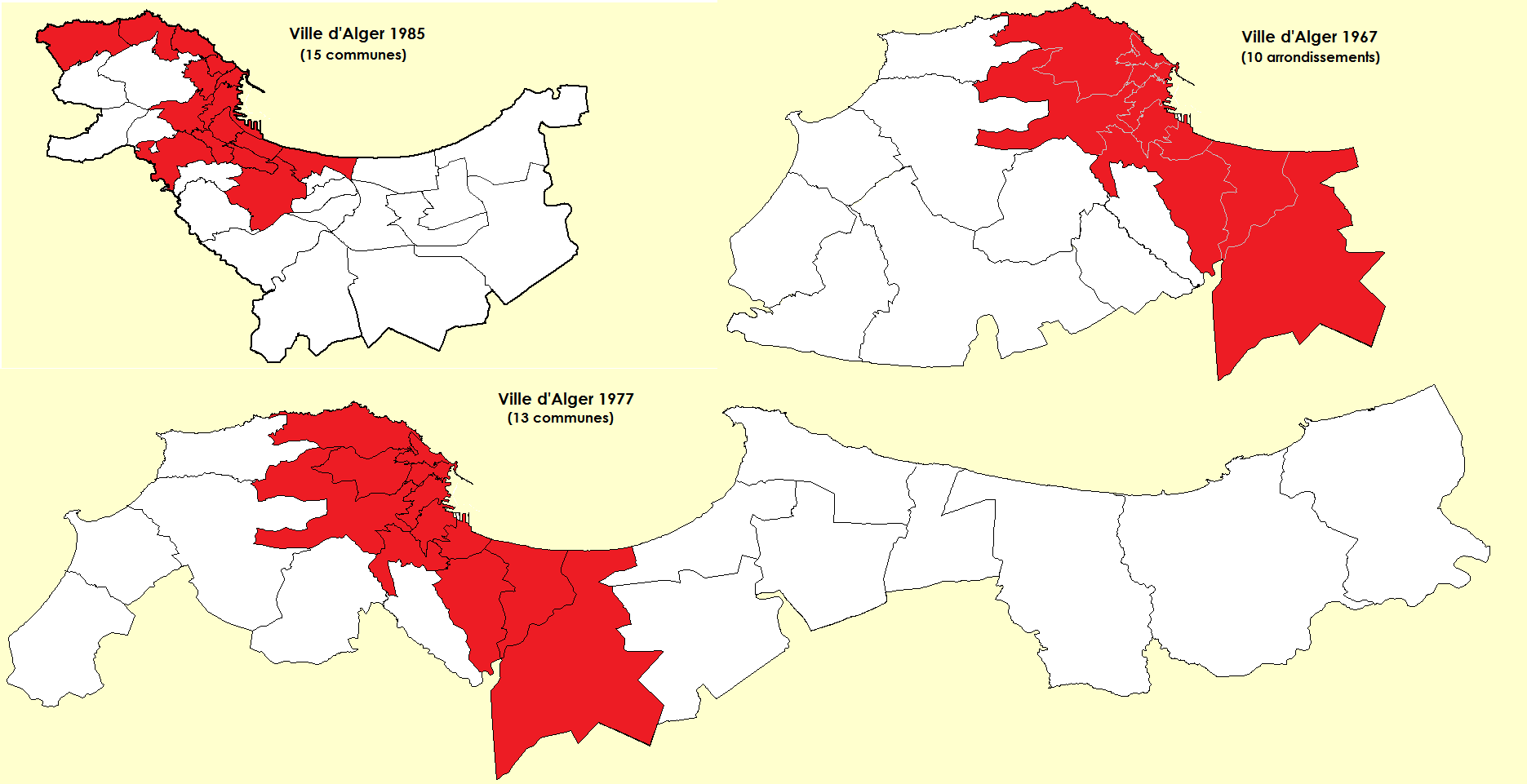 Evolution de la composition de la ville d'Alger entre 1959 et 1985